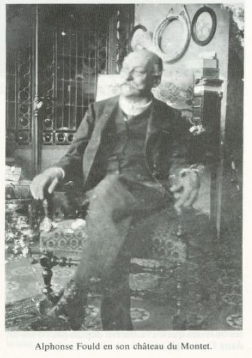 Photo prise au château du Montet